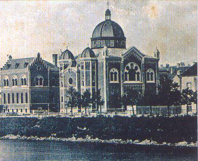 Die Synagoge am Grieskai in Graz aus einer hist. Aufnahme um 1900, Archiv Karl-Albrecht Kubinzky